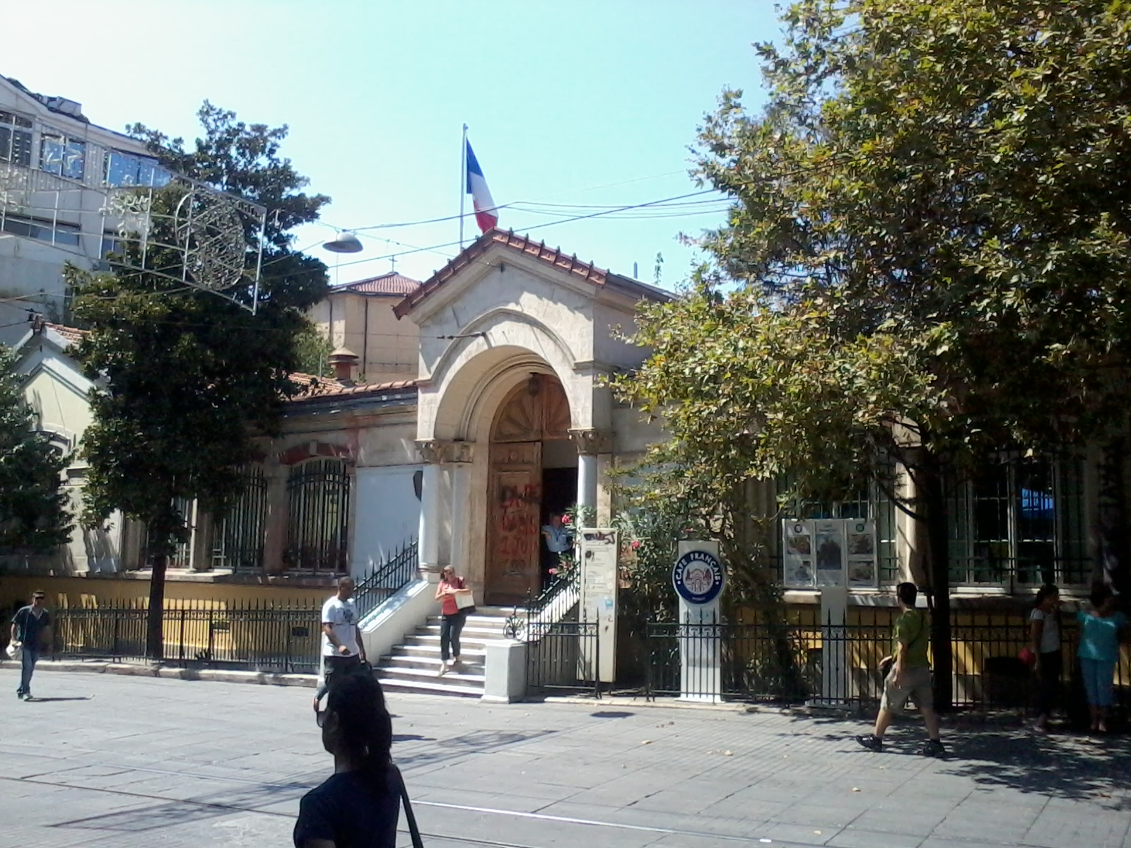 İstanbul'daki Fransa Başkonsolosluğu.